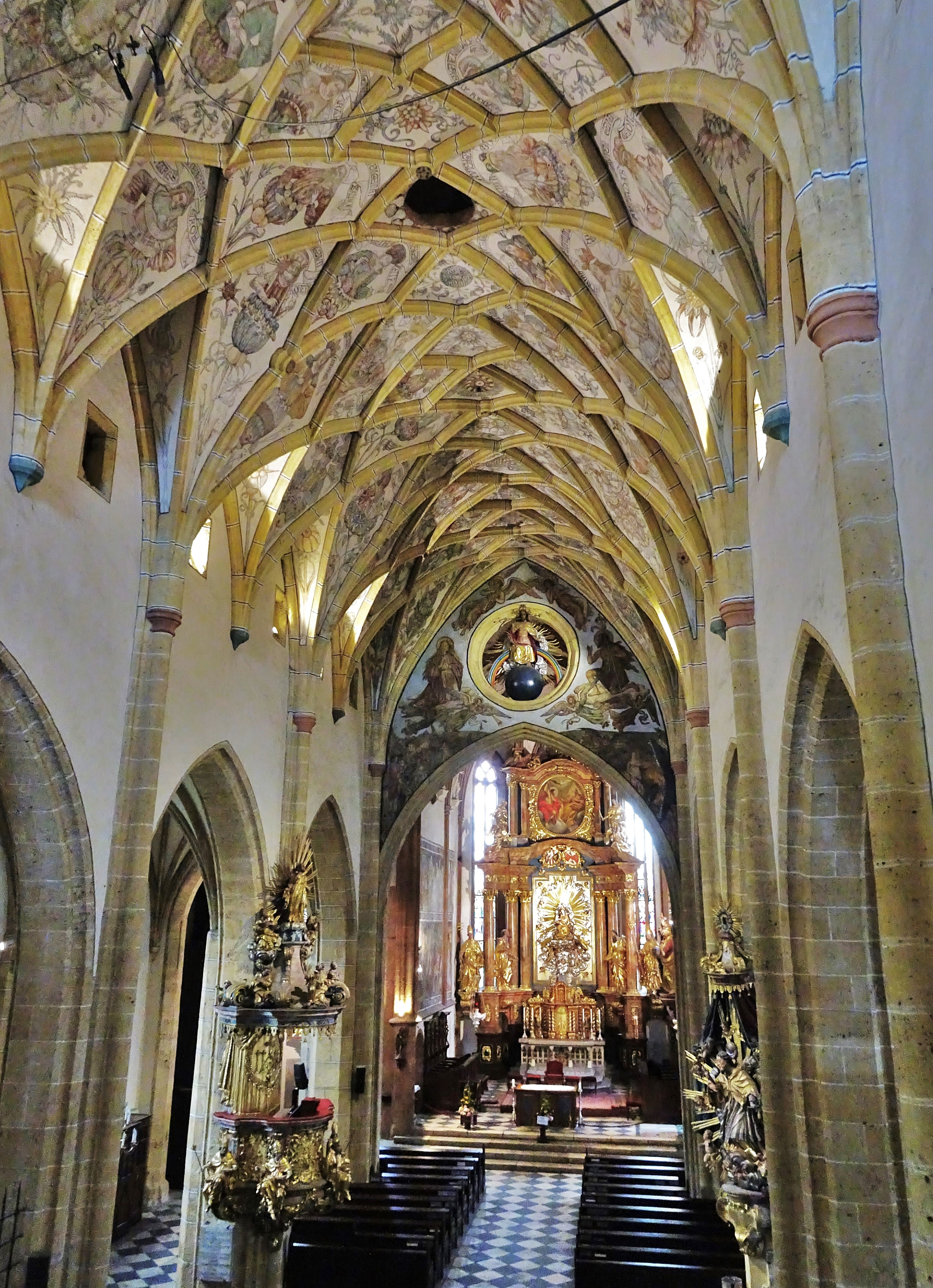 Wallfahrtskirche, Collegiat-Stiftskirche Maria Himmelfahrt Maria Saal, Innenansicht von der Westempore gegen den Hochaltar